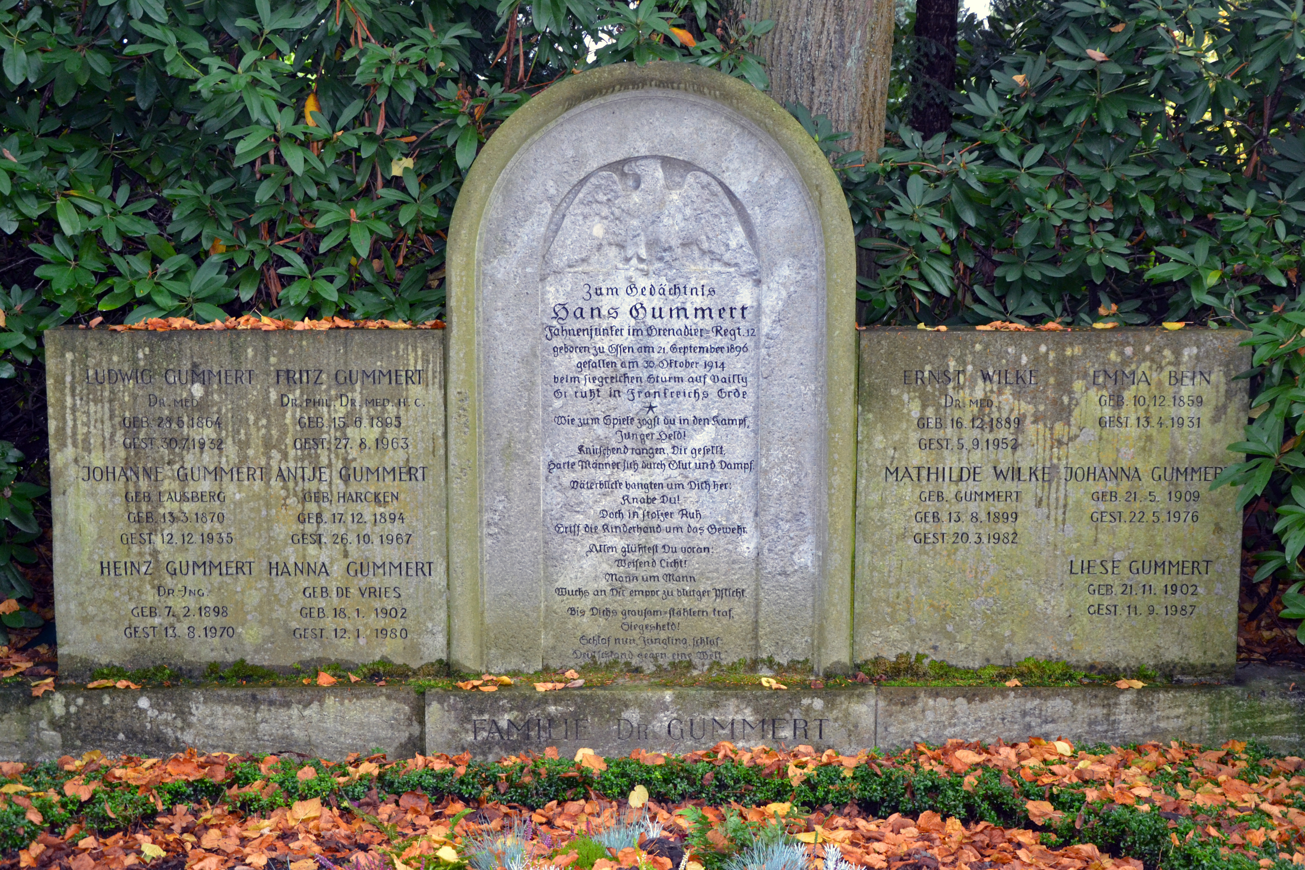 Friedhof Bredeney, Grabmal Familie Gummert, Fritz Gummert war deutscher Industrie-Manager